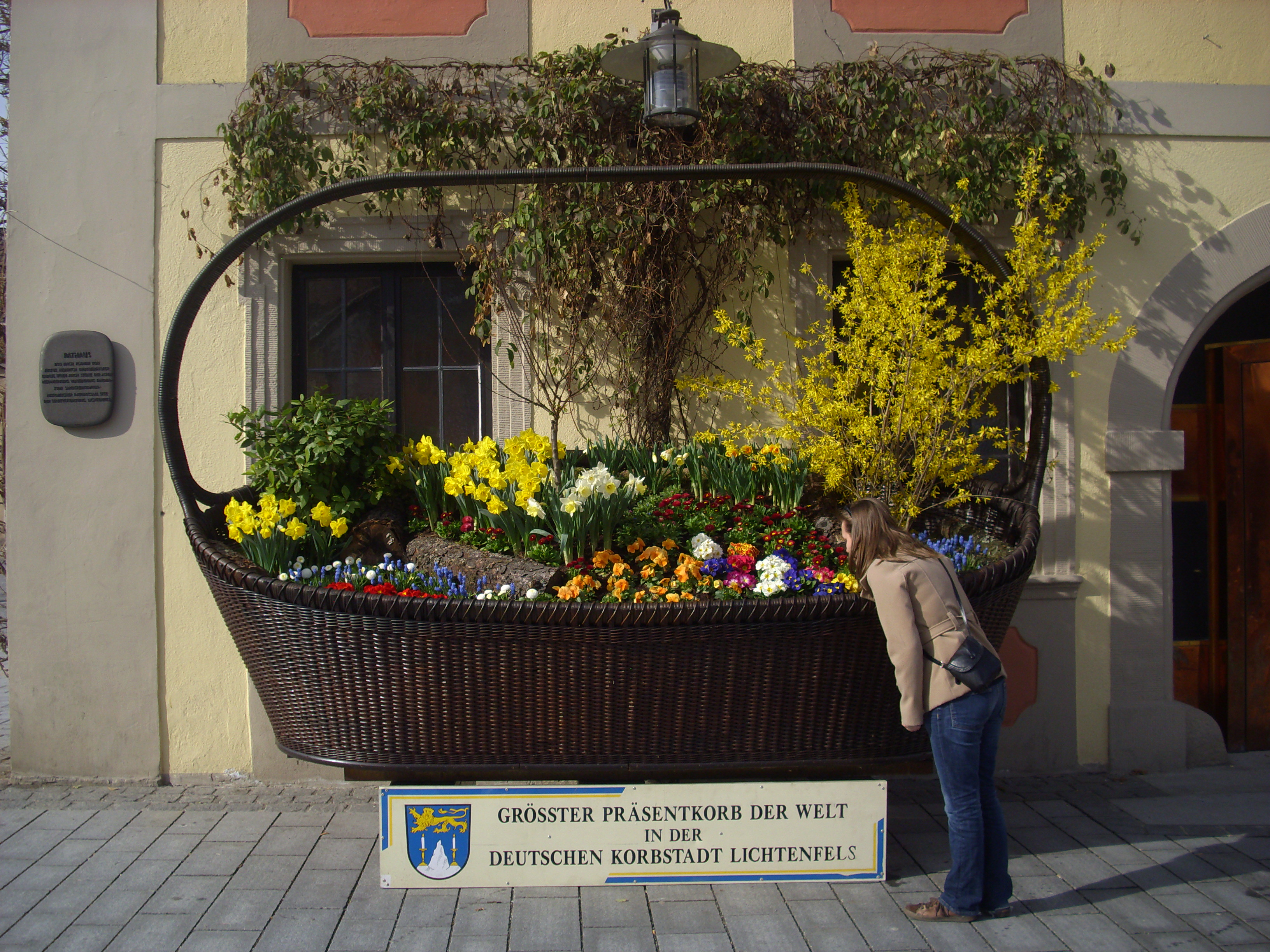 Größter Präsentkorb der Welt in der Korbstadt Lichtenfels (Oberfranken).